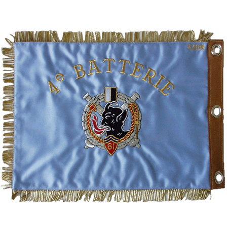 Fanion de la 4e batterie